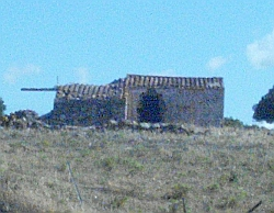 Furriadroxiu in territorio di Teulada